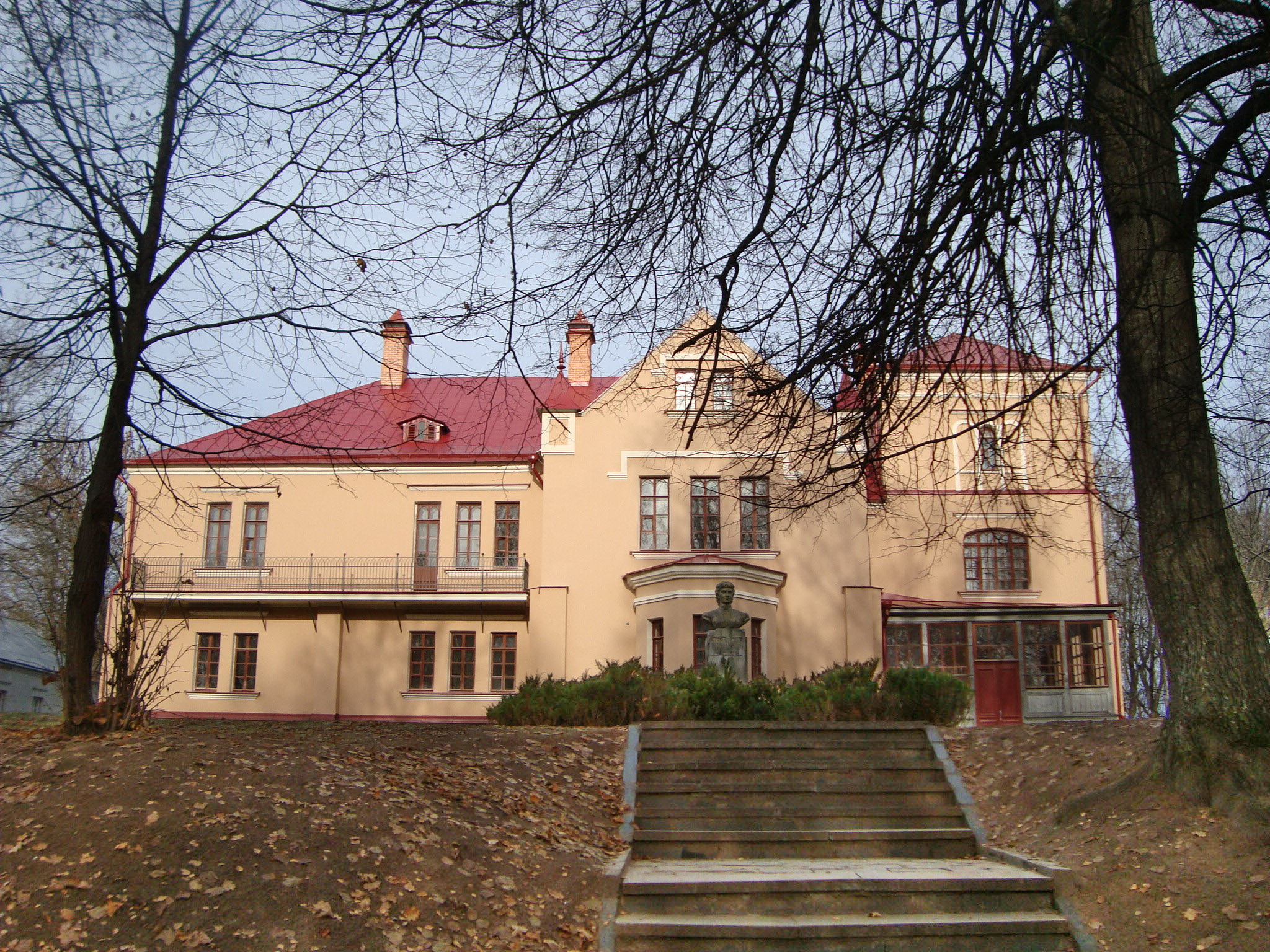 дом усадебный (Псковская область, Великие Луки, деревня Полибино)